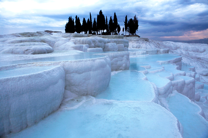 Travertenlerde beyazlığın oluşumunda hava şartları, ısı kaybı, akışın yayılımı ve süresi etkili oluyor.